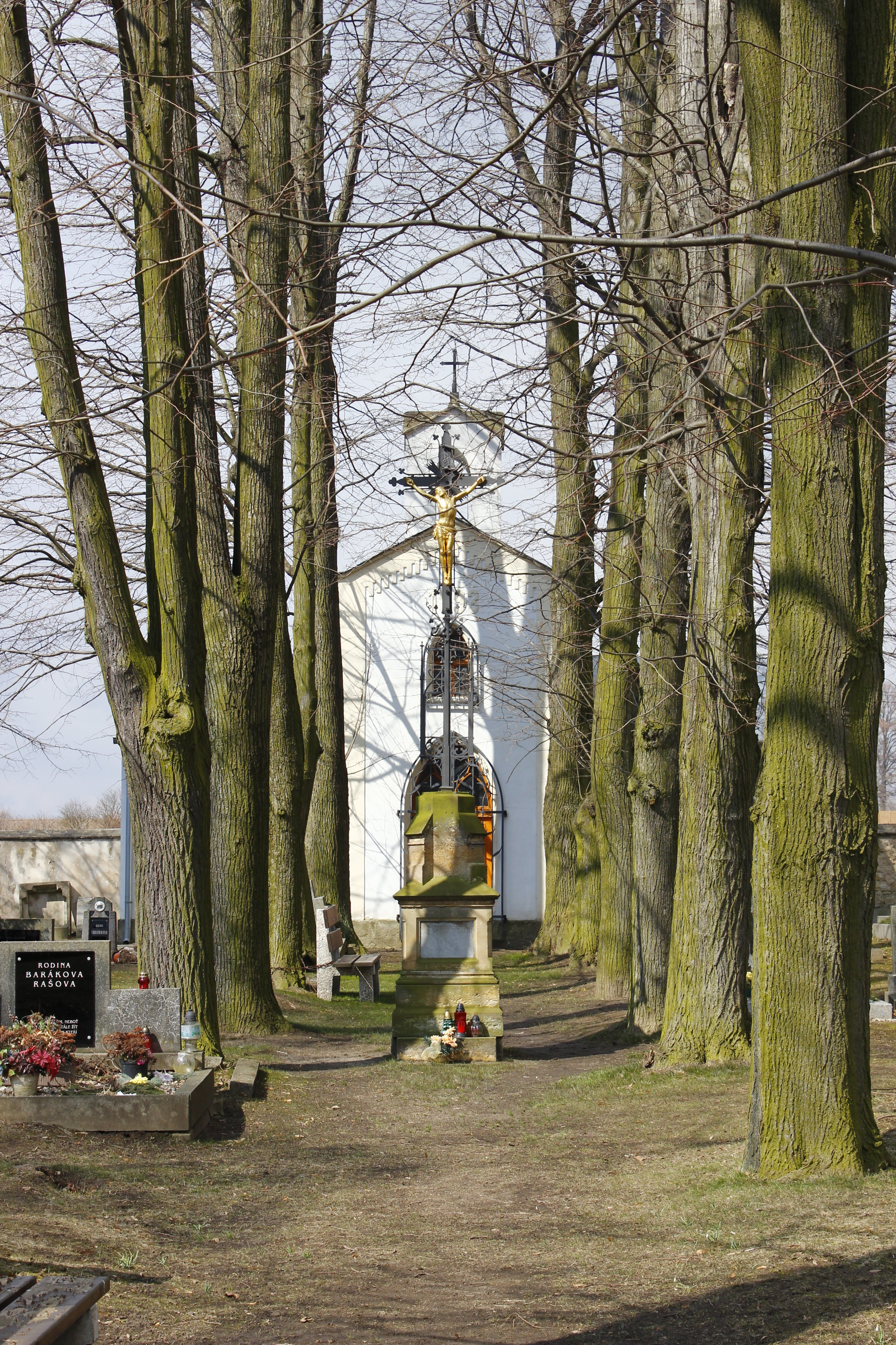 Kříž na hřbitově v Malých Horkách, části Rokytovce. V pozadí je vidět hřbitovní kaple.